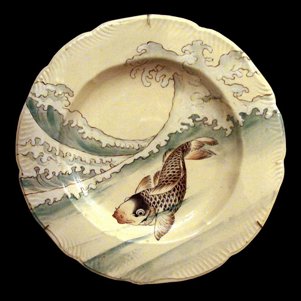 Assiette plate Edition Eugène Rousseau Manufacture de Creil et Montereau (Lebeuf, Milliet et Cie) 1873-1875 Salle des orientalismes Musée d'Orsay acquisition en 2007